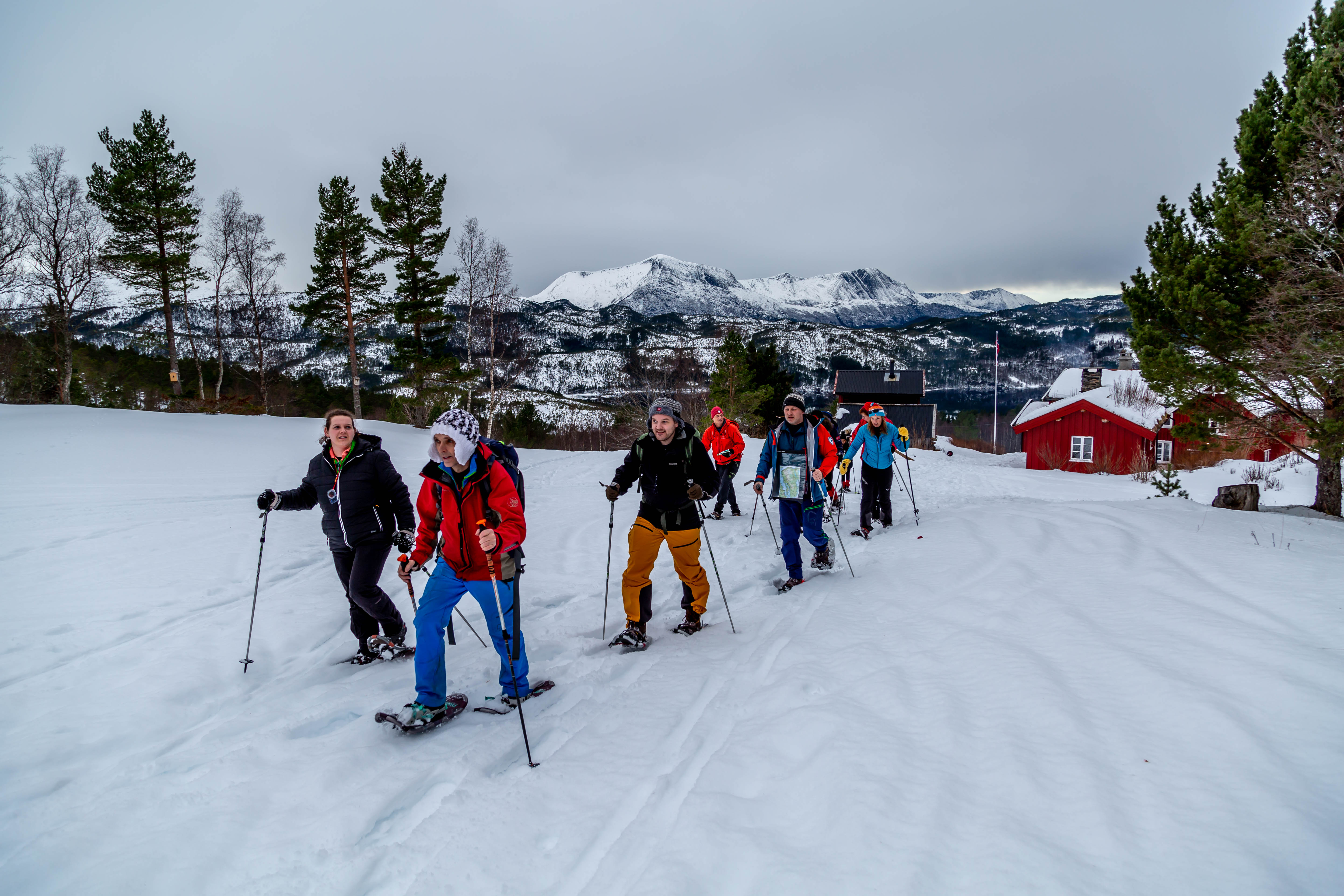 Fra turlederkurs på Nersetra. Hytta er drevet av Kristiansund og Nordmøre Turistforening